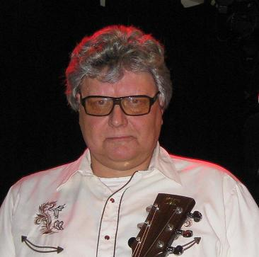 Specs Hildebrand tijdens Christmas Cover Up in Paradiso, Amsterdam